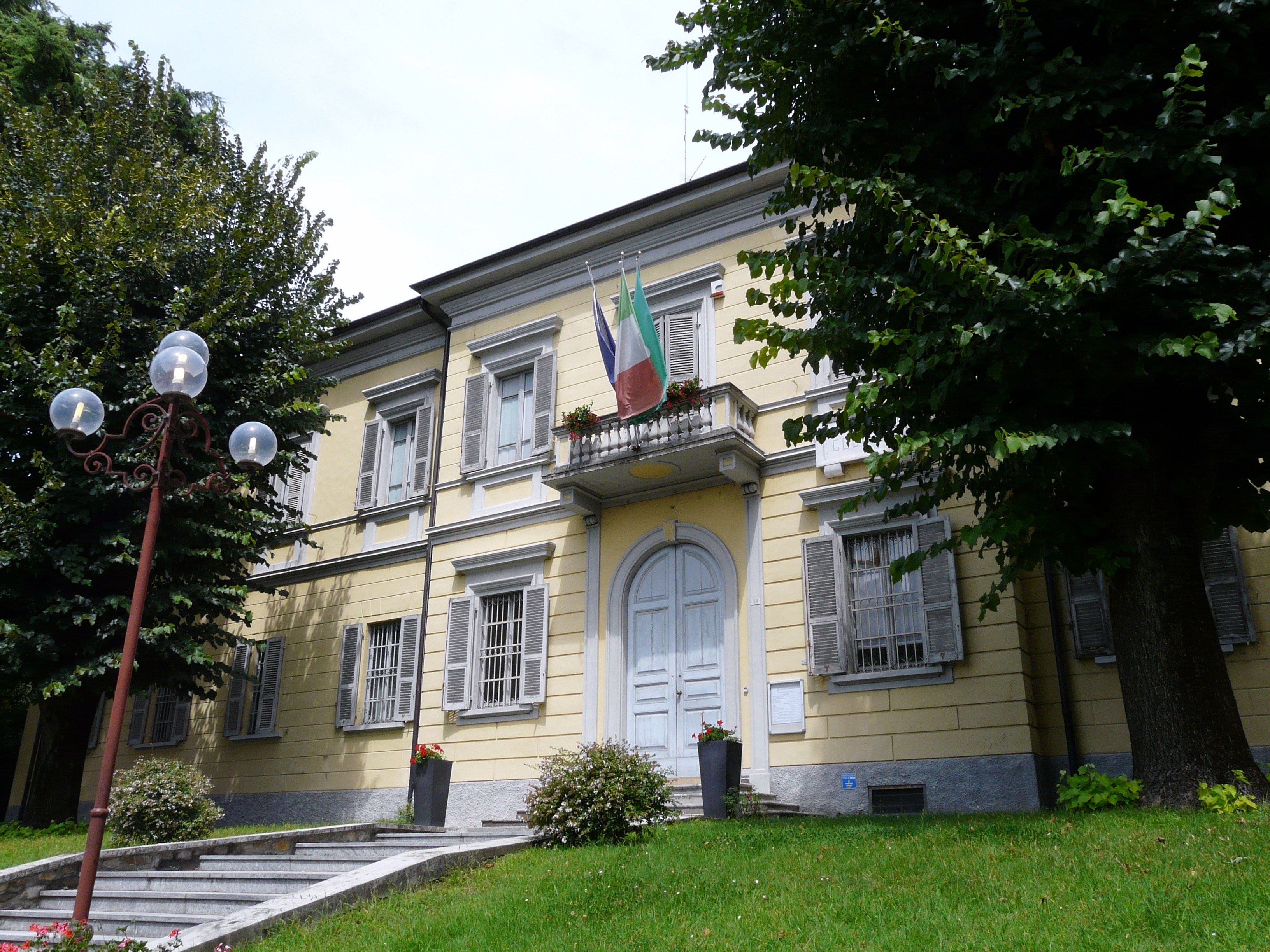 Municipio, Goadiasco, Lombardia, Italia